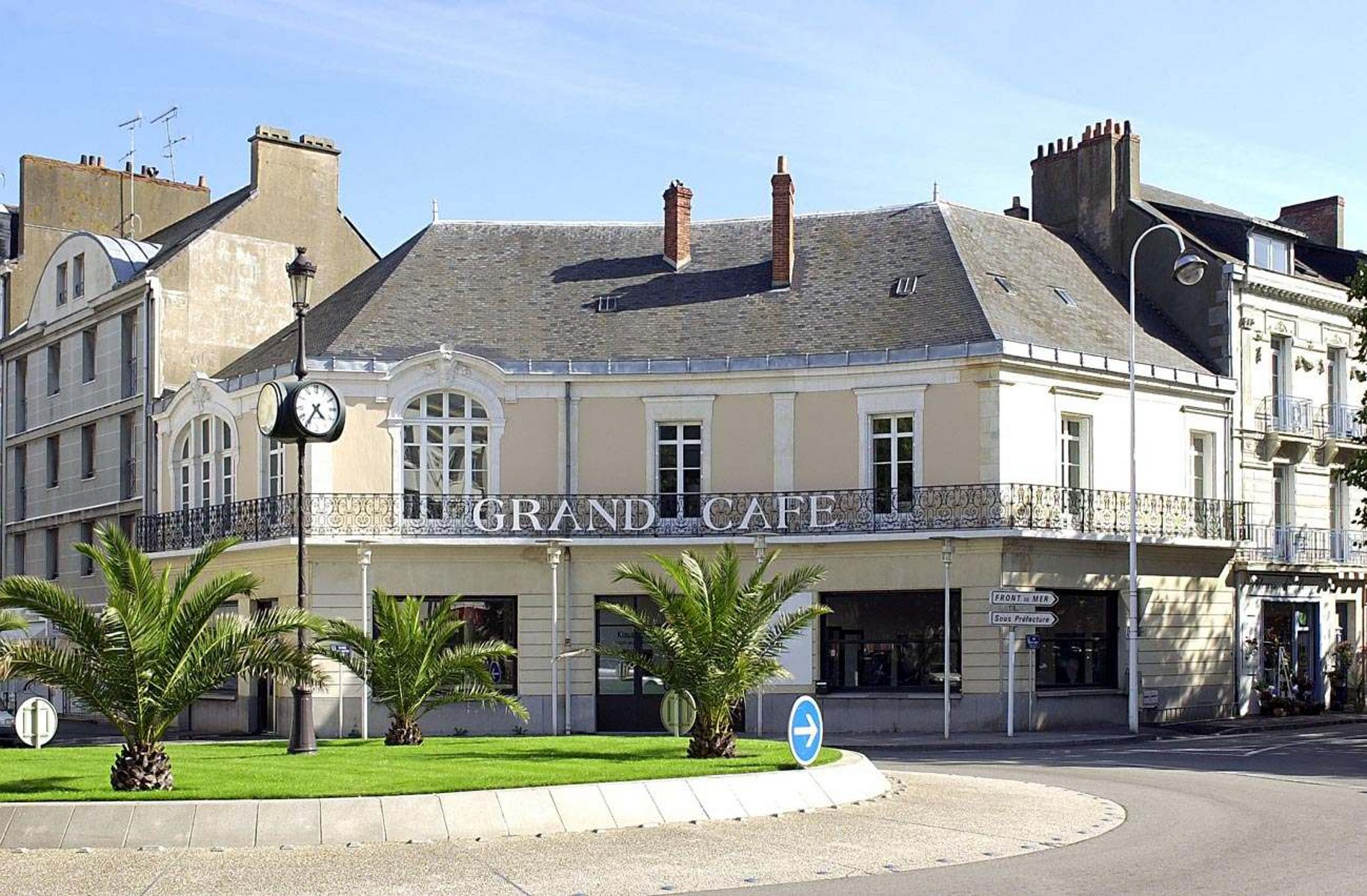 Le Grand Café, centre d'art contemporain